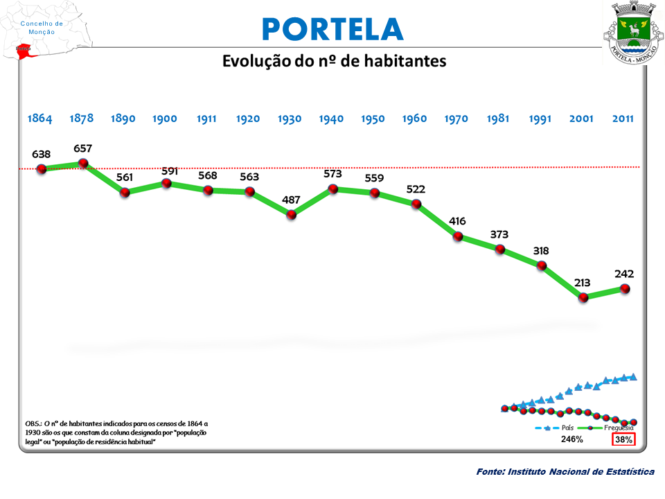 Censos 1864/2011